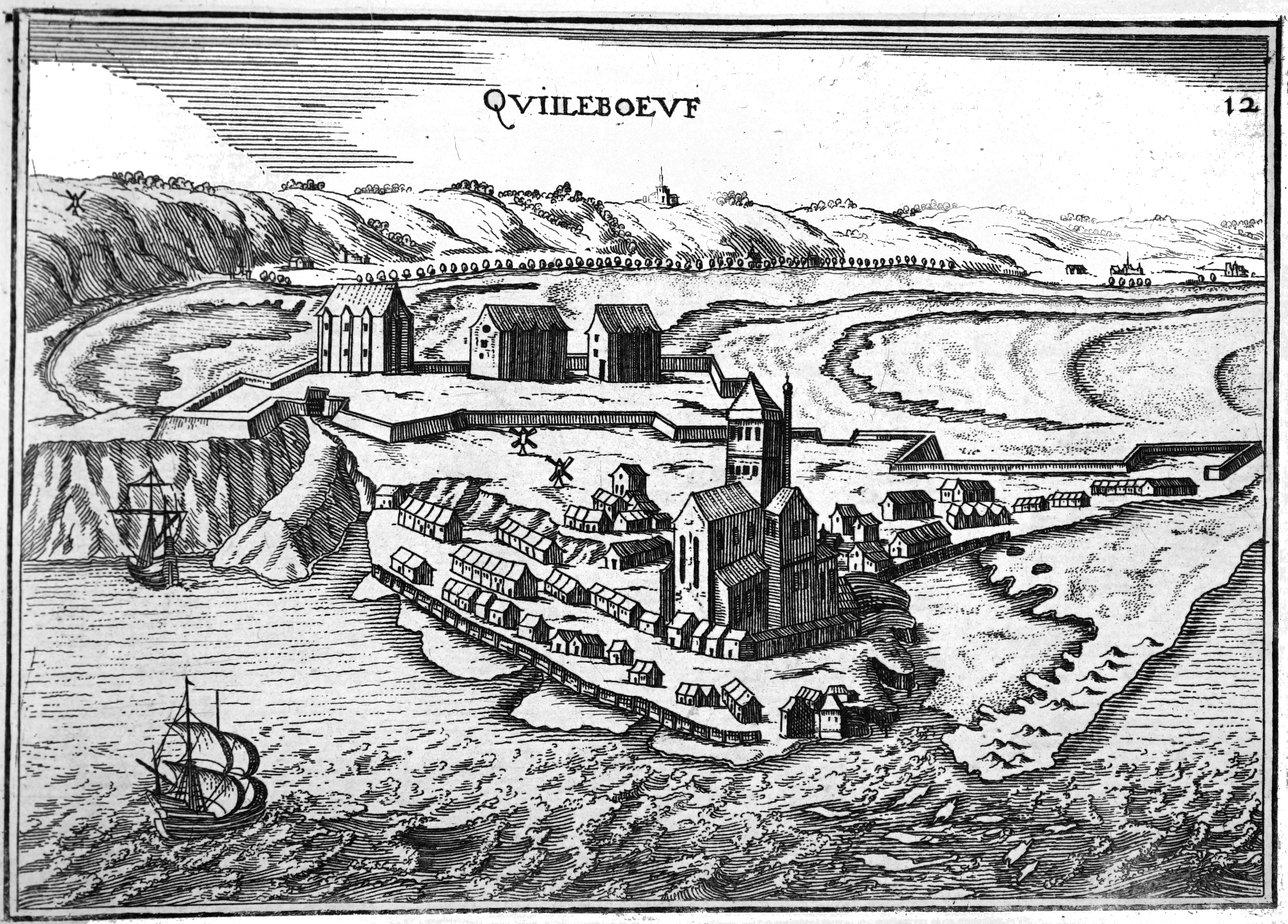 sur un dessin de Tassin dans Plans et profils...'.